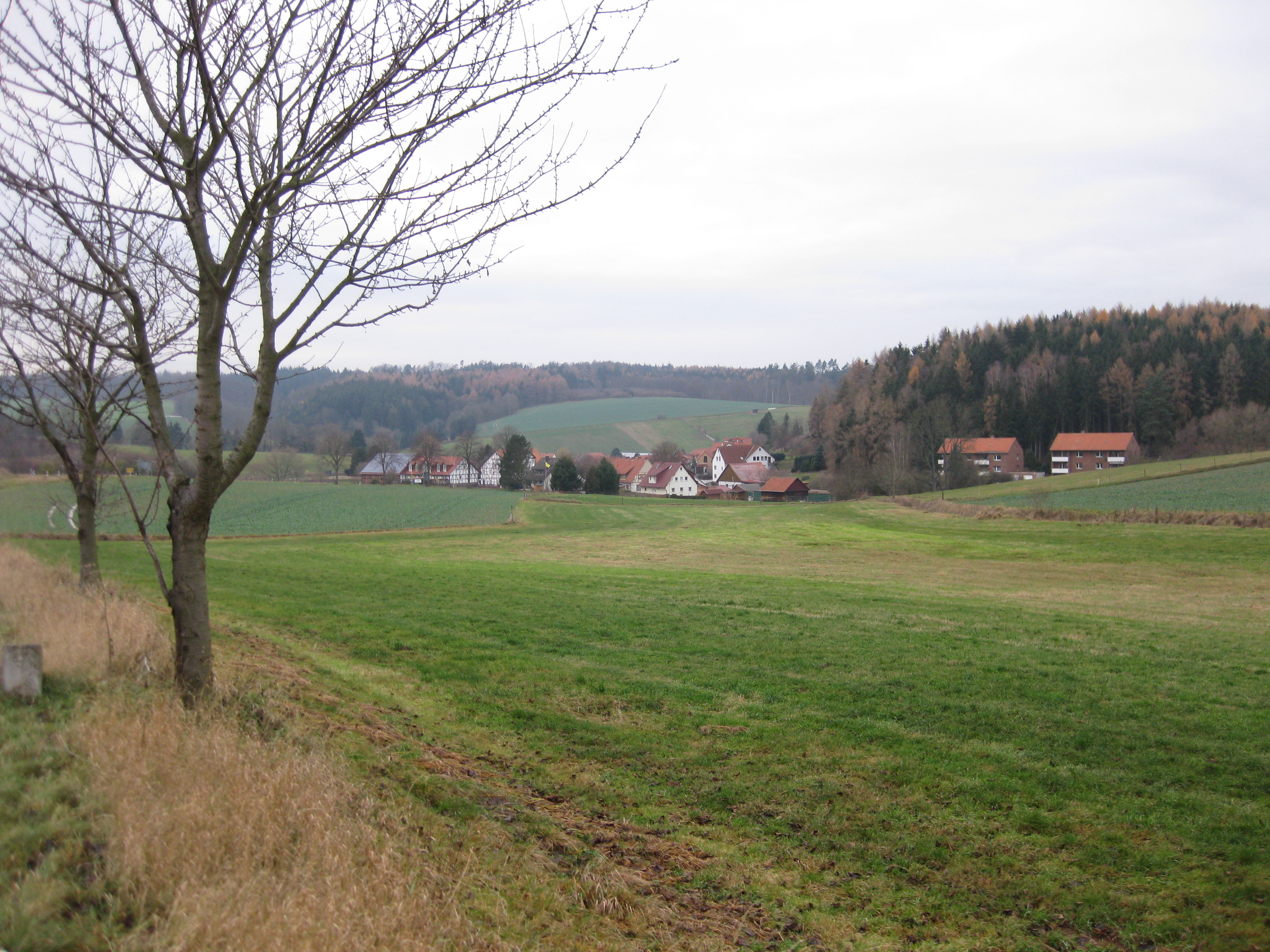 Teilansicht auf Bremke von Osten gesehen